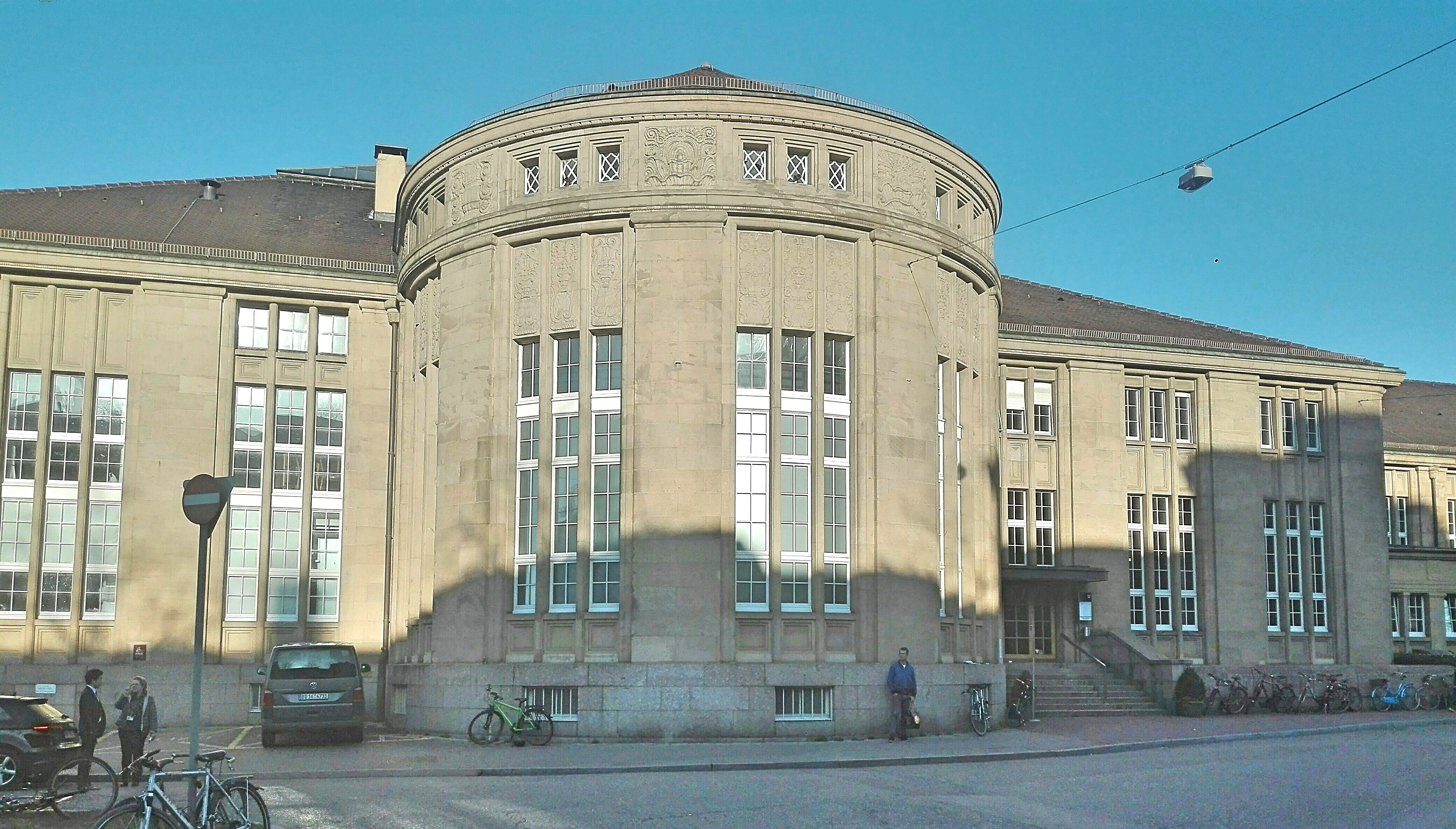 Strassenseite beim Badischen Bahnhof